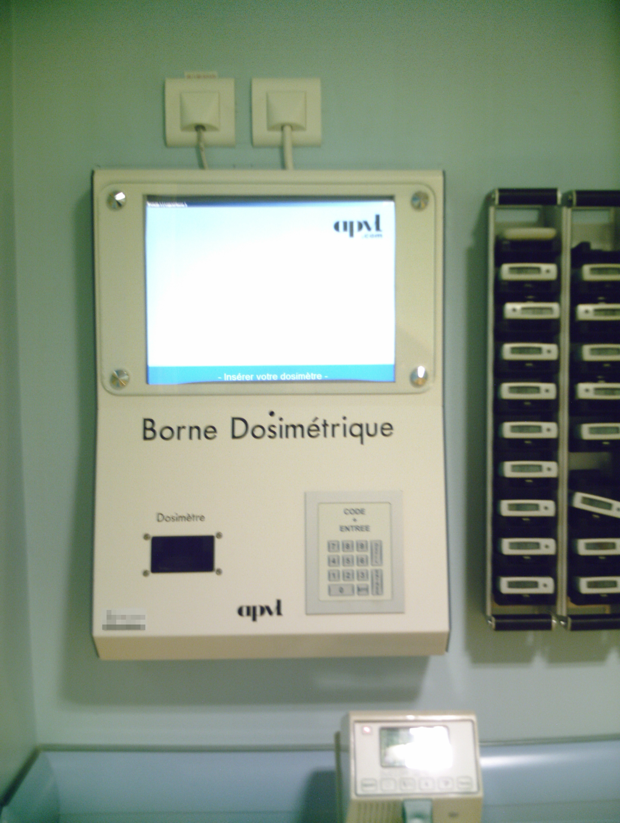 Borne destinée à la lecture des dosimètres dans un service de médecine nucléaire.